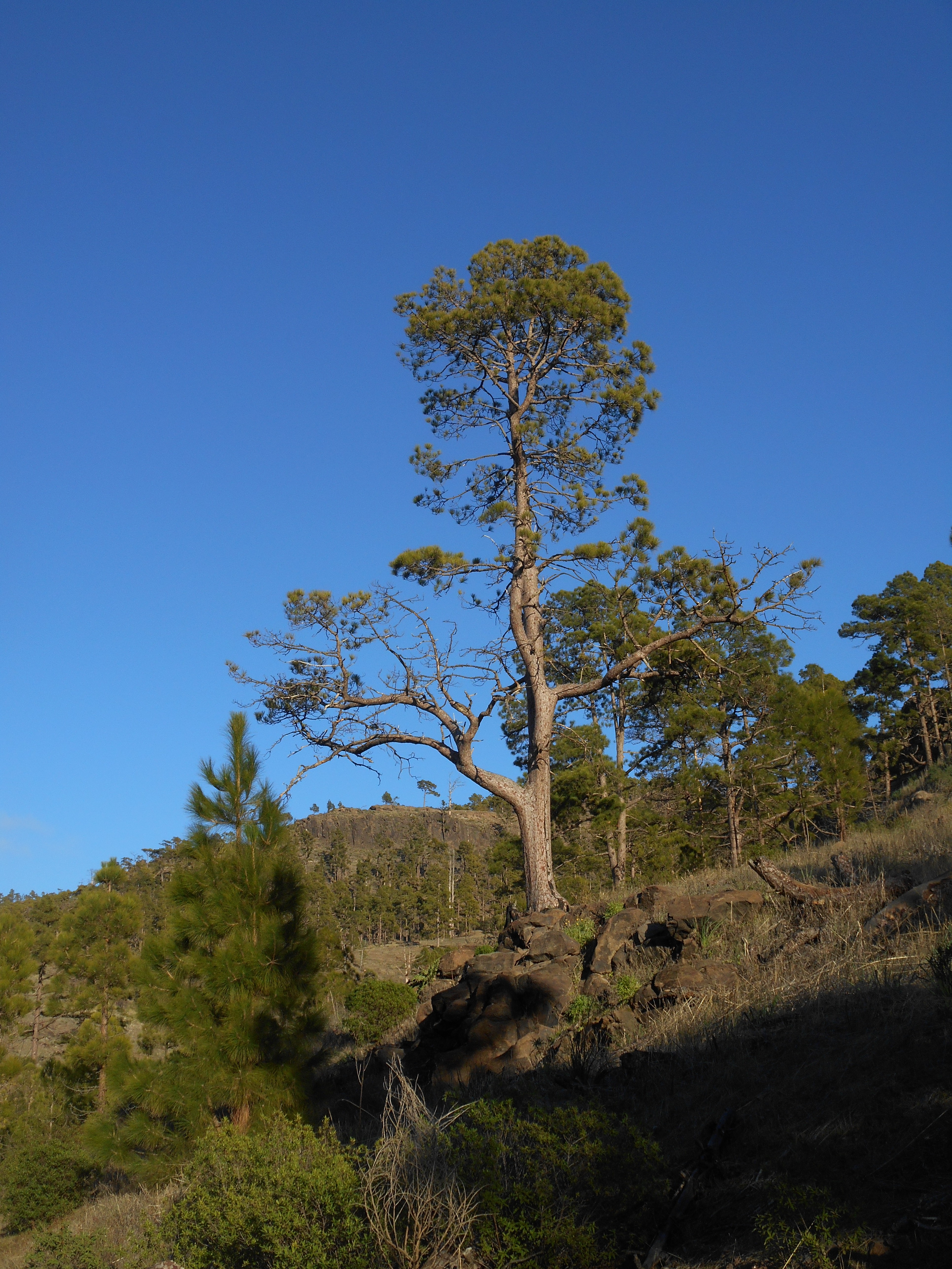 En Ojeda, vista general de este precioso pinar. This is a photography of a Site of Community Importance in Spain with the ID: ES0000041. Natura2000 entry, EEA entry